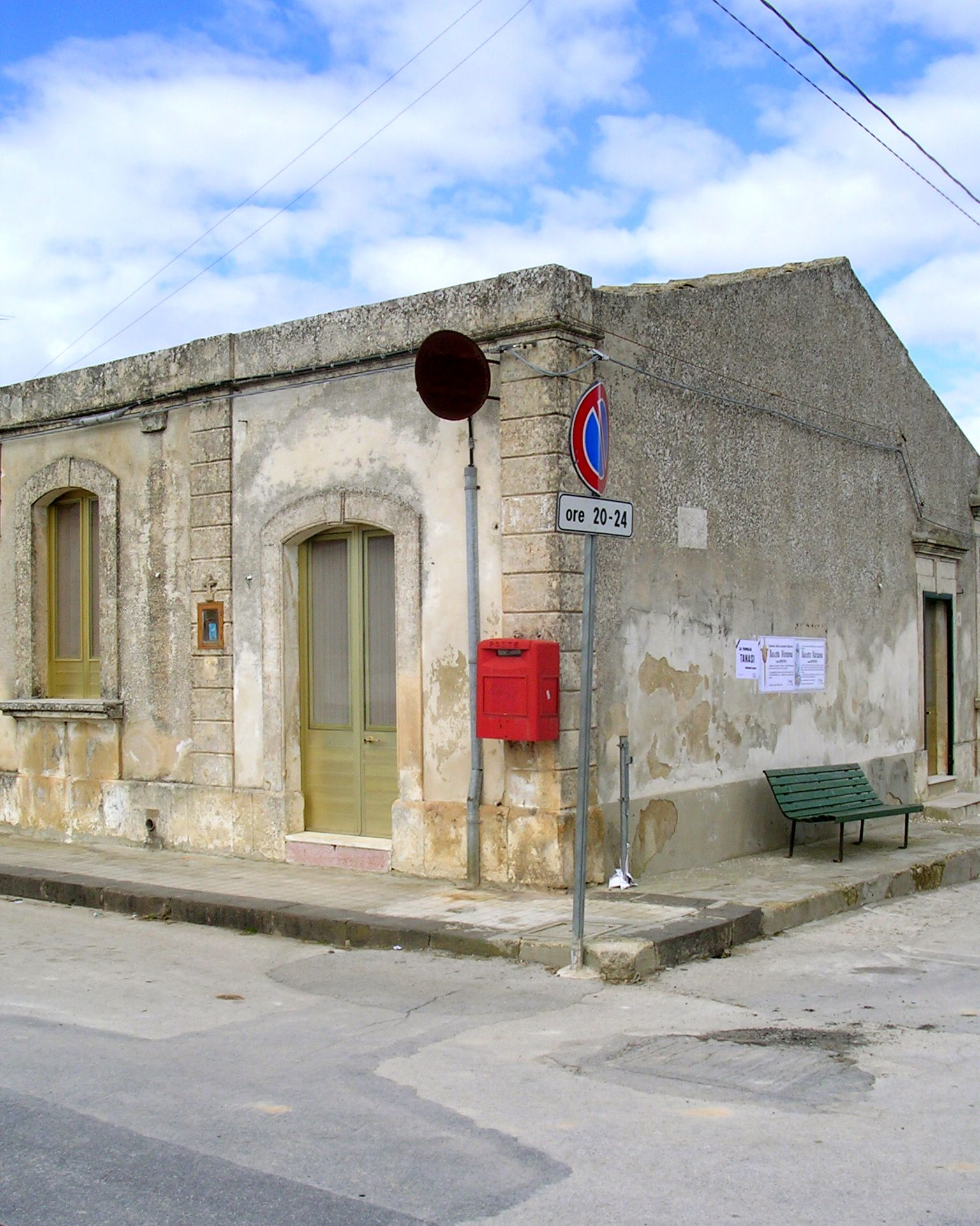 Testa dell'acqua, Noto, Sicilia, Italia